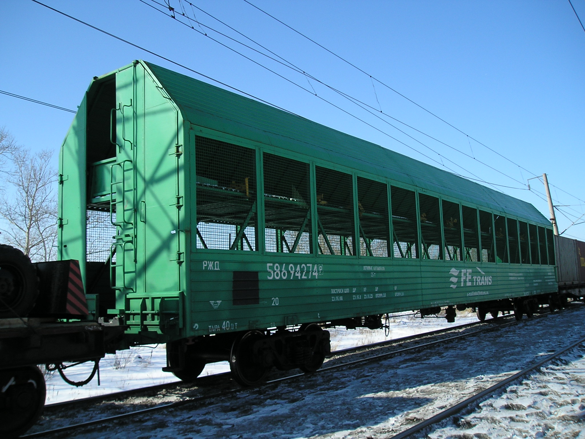 Крытытй вагон для перевозки автомобилей